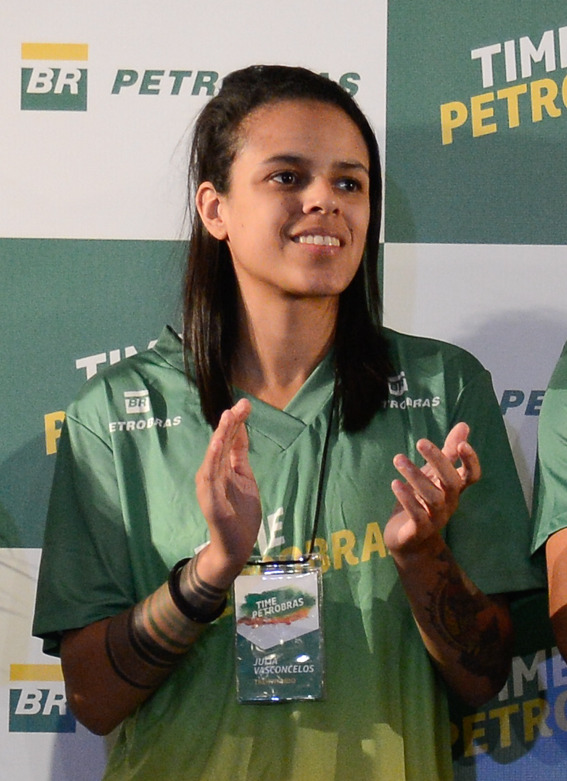 Rio de Janeiro - Atletas olímpicos que representam o Brasil nos Jogos Rio 2016 patrocinados pela Petrobras (Fernando Frazão/Agência Brasil)